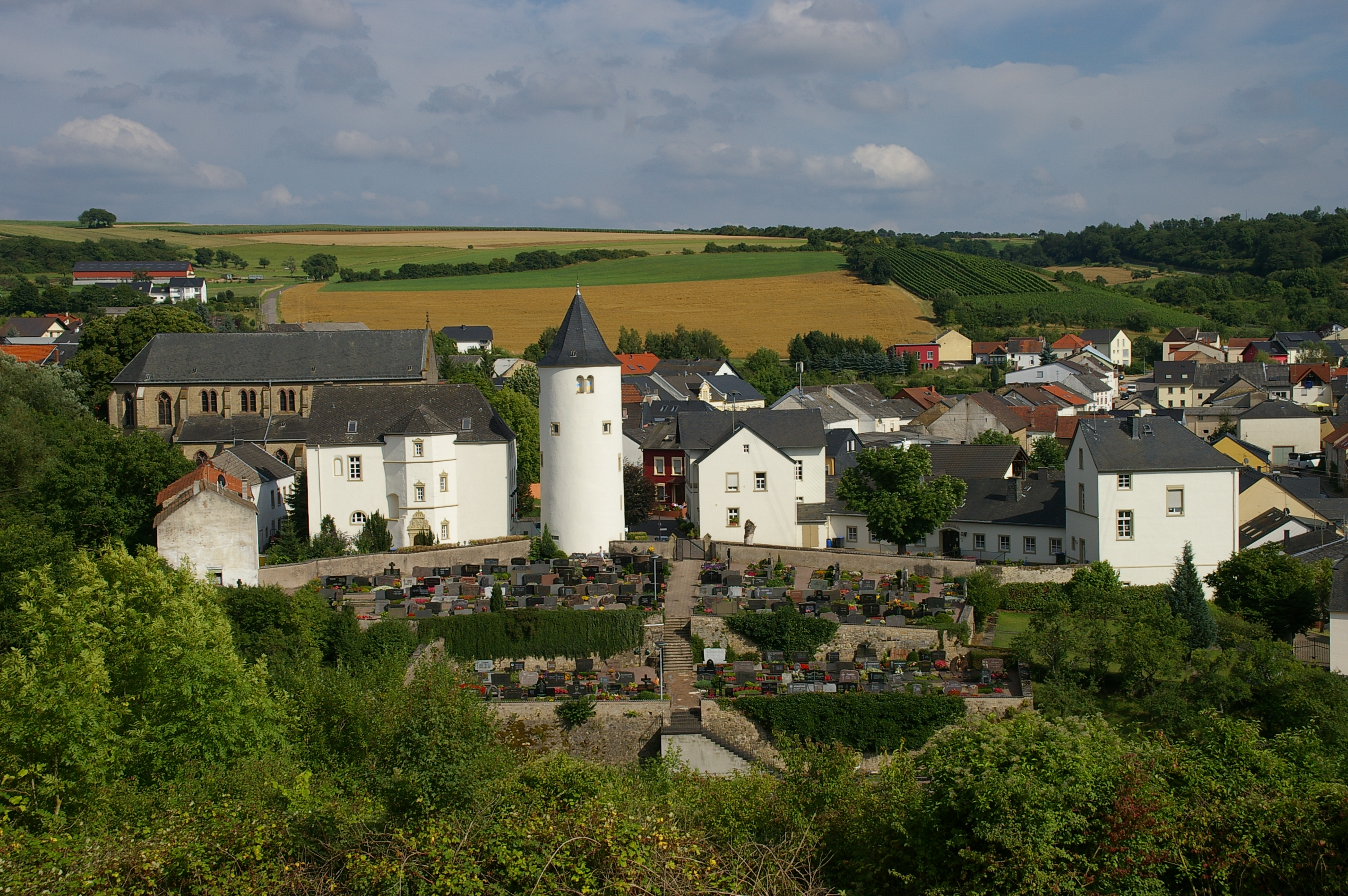 Burganlage WincheringenThis is a photograph of an architectural monument.It is on the list of cultural monuments of Wincheringen